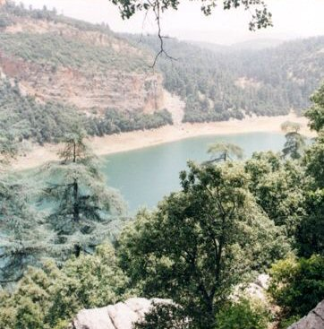 Image Agmamae azizza photo personnelle de Hadraj Said